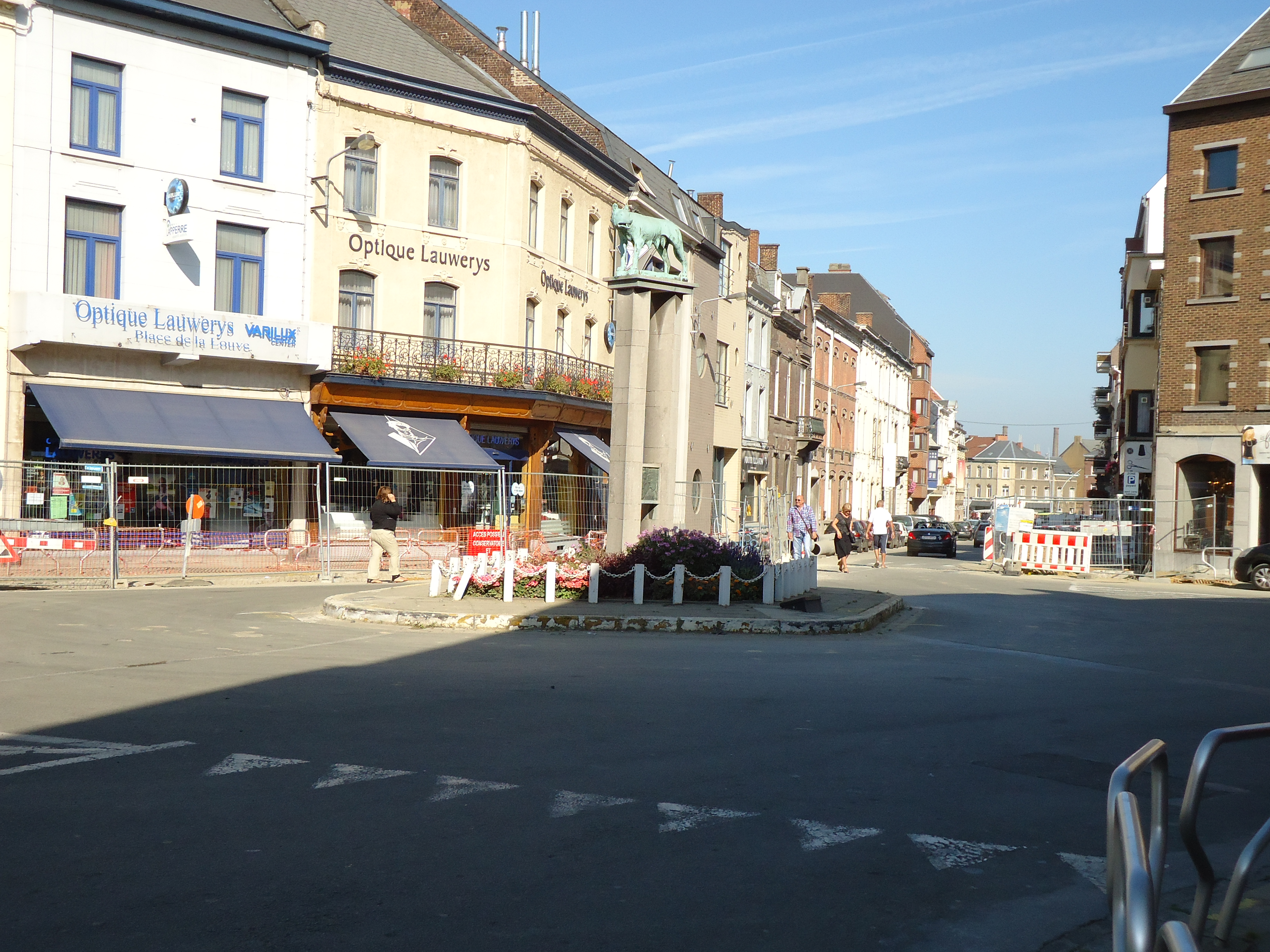 La Louvière